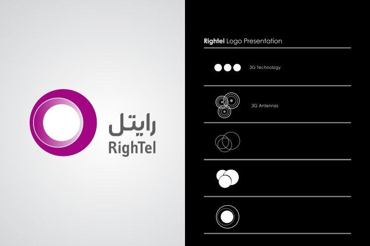 طراحی لوگوی رایتل تورج صابری‌ وند